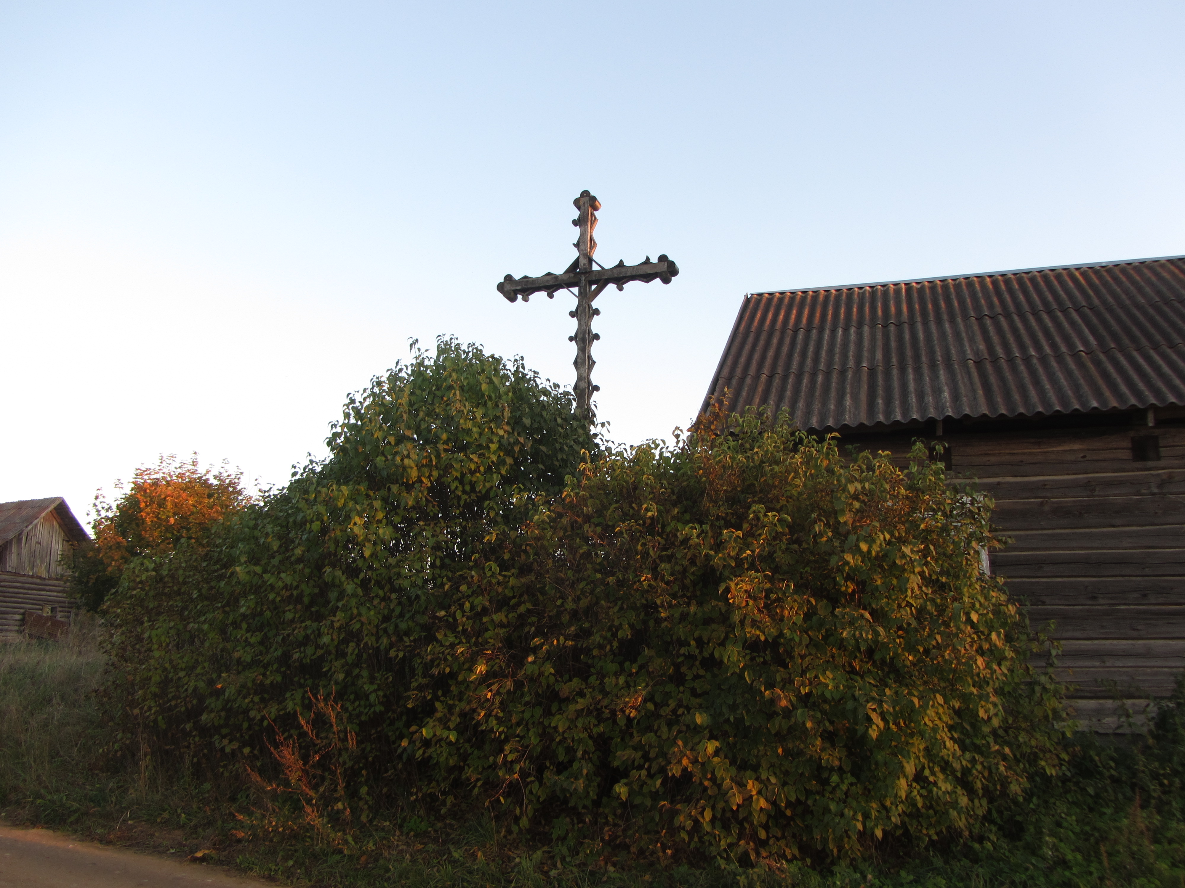 Berniūnai 18238, Lithuania